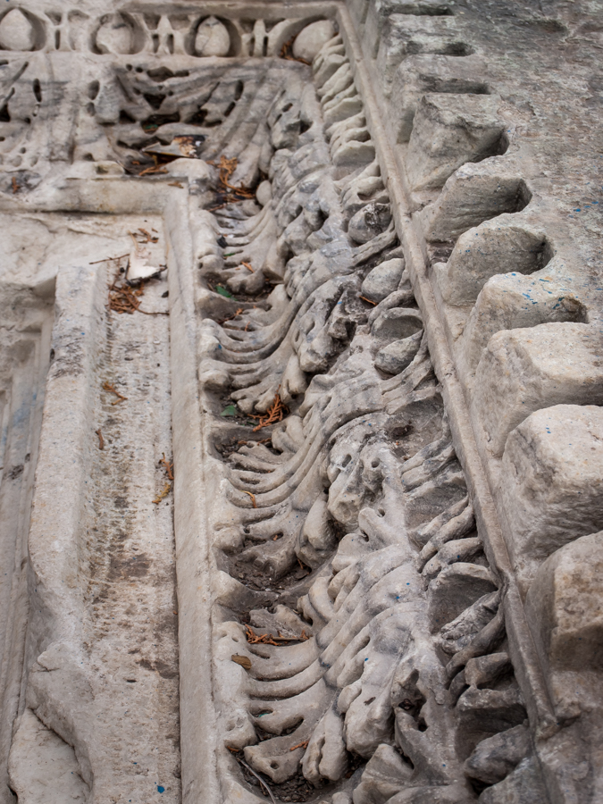 Situl arheologic „Orașul antic Tomis”